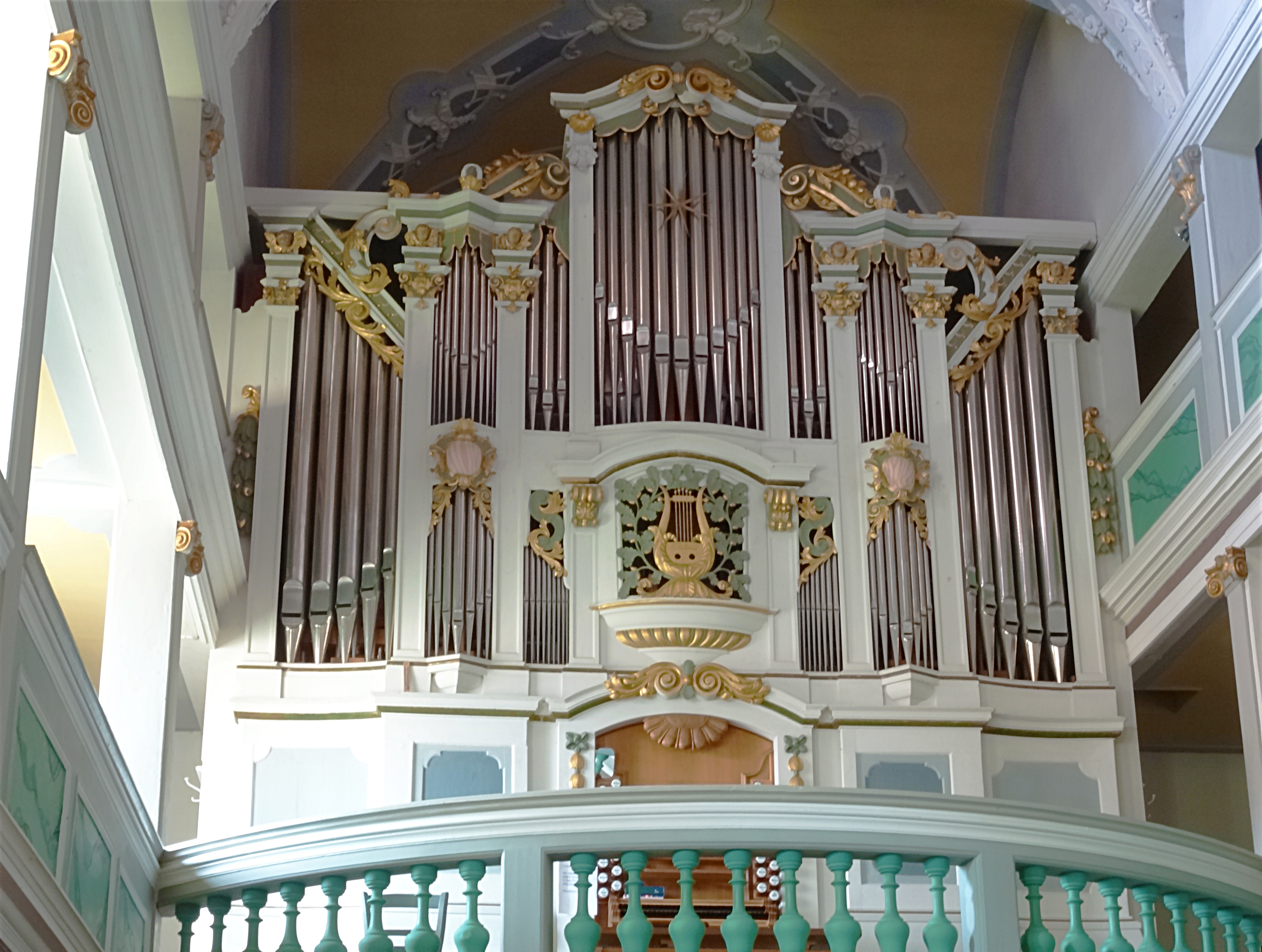 Böhm-Orgel von 1991 in der Stadtpfarrkirche Sankt Marien zu Bad Berka im historischen Prospekt des Weimarer "Hof-Orgelmacher" Heinrich Nicolaus Trebs (1743) [1][2]